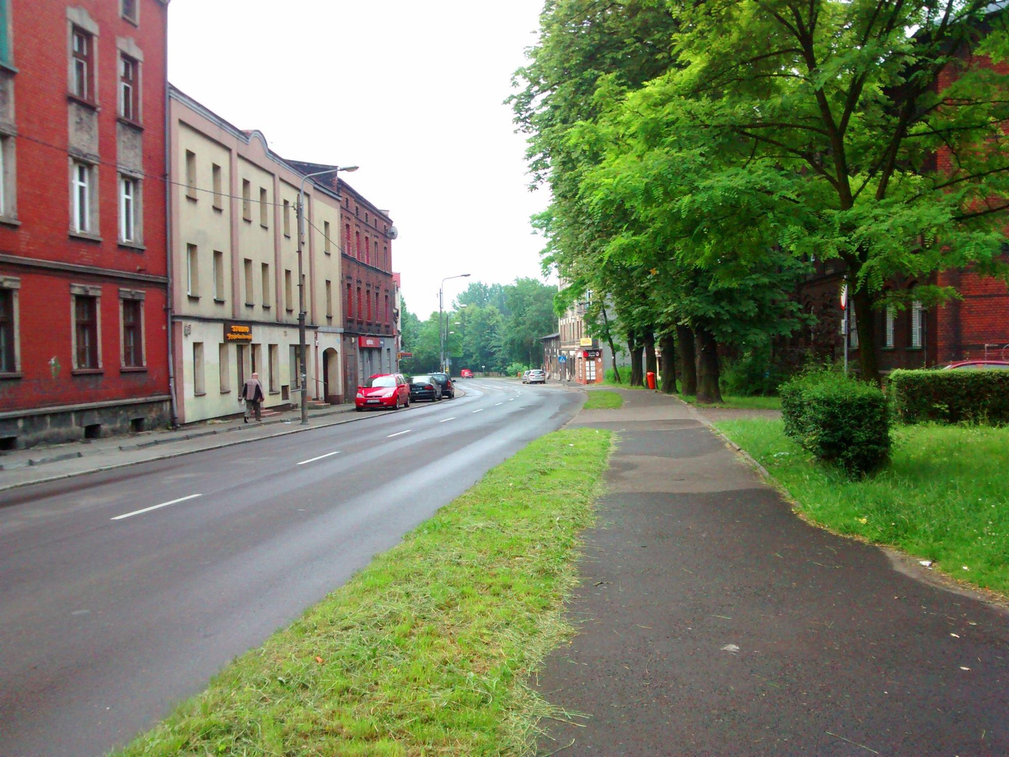 ulica gen. Józefa Hallera w Katowicach (dzielnica: Burowiec)